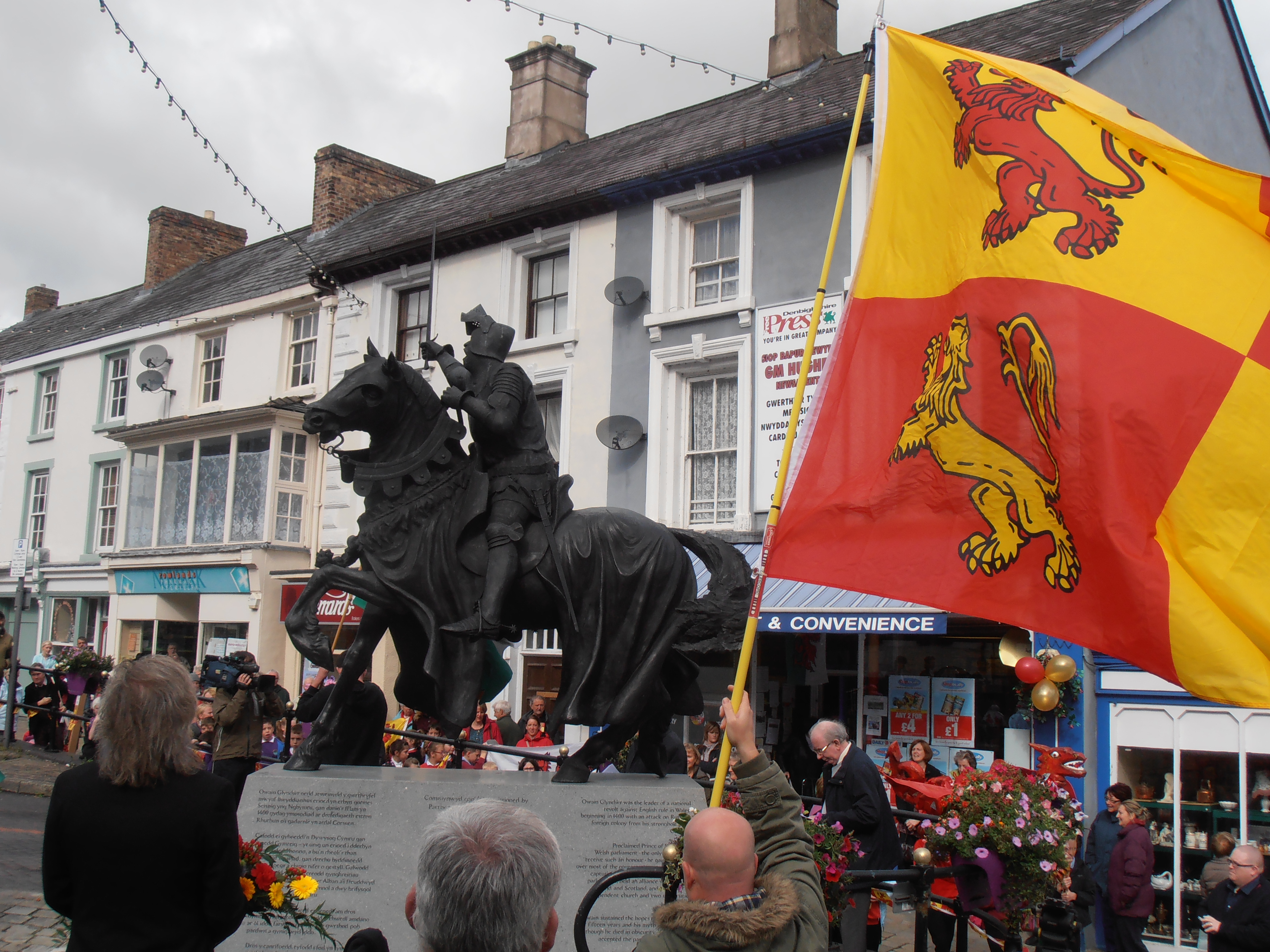 Dathliadau Owain Glyn Dwr yng Nghorwen; Medi 16 2013. Sir Ddinbych. Band Cambria: drymwyr a ffliwt.